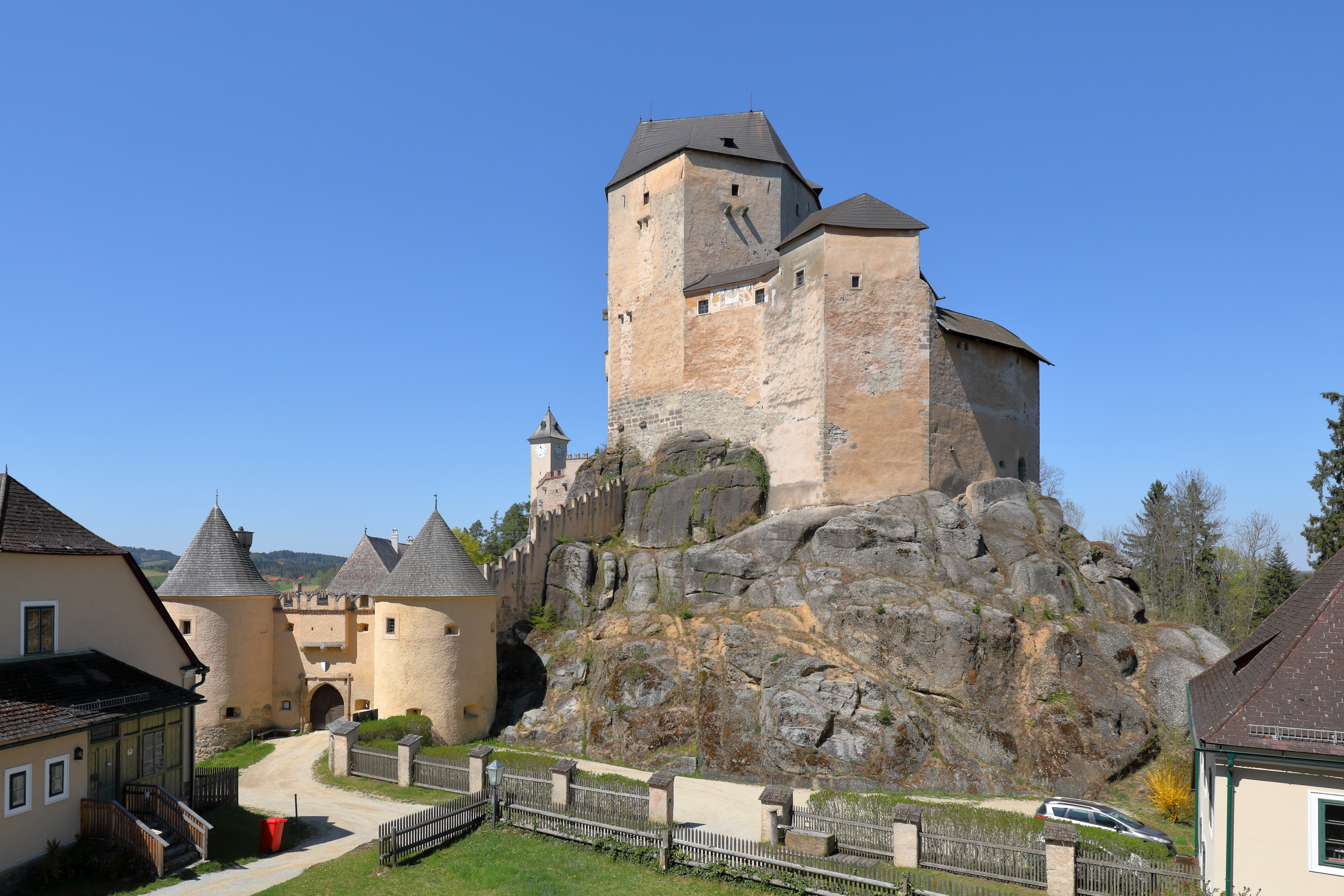 Südostansicht der Burg Rappottenstein im westlichen Waldviertel und auf dem Gemeindegebiet der niederösterreichischen Marktgemeinde Rappottenstein.Die bedeutende Burganlage des 12. Jahrhunderts wurde nie erobert und von den Kuenringer errichtet. Nach mehreren Besitzerwechsel kam sie 1664 durch Kauf an die heutigen Besitzer, die Grafen von Abensperg und Traun.